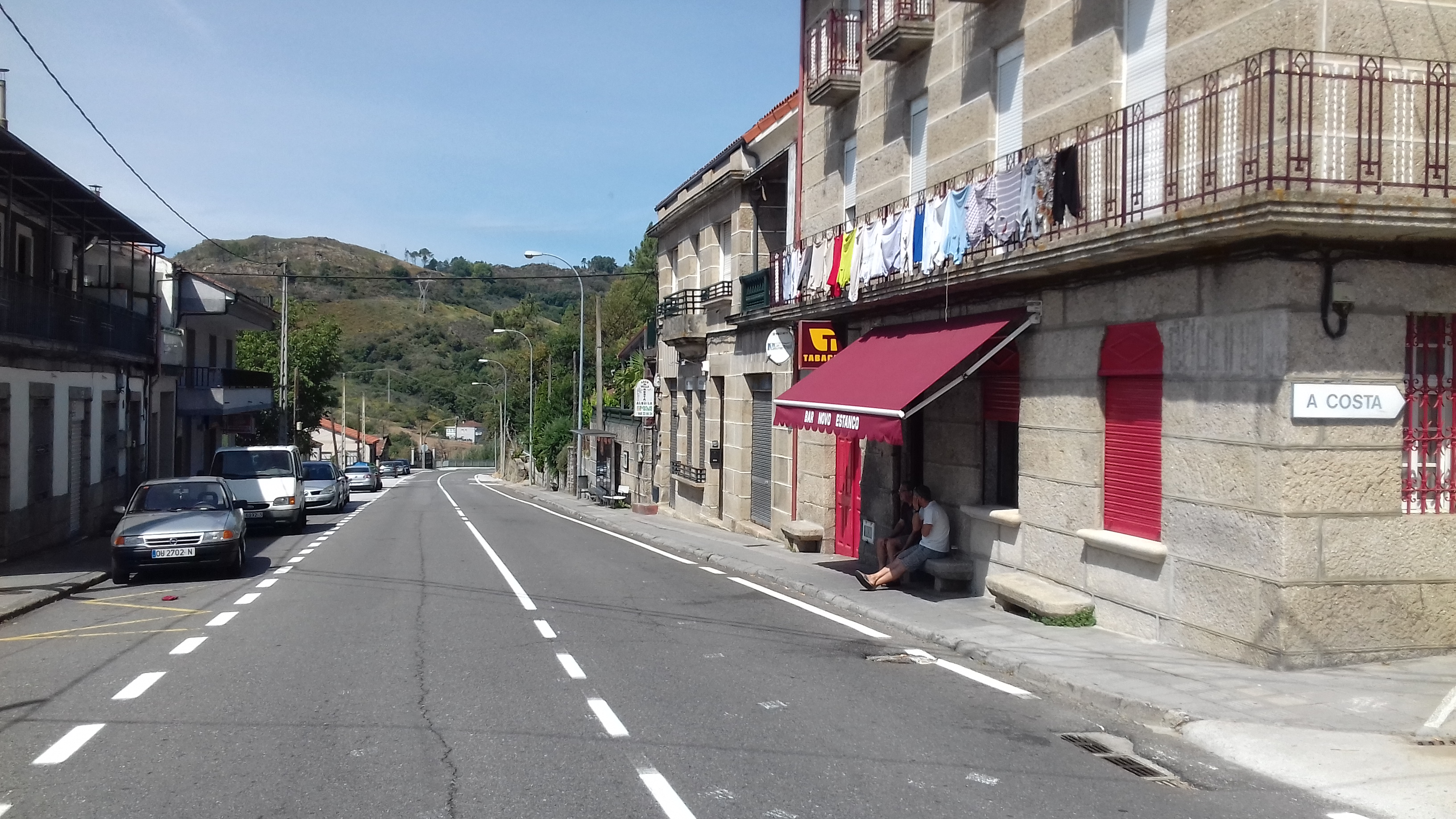 Aldea de Cudeiro (Cudeiro, Ourense), no cruzamento da estrada OU-150 (tramo da antiga N-525) e a Vía da Prata do Camiño de Santiago polo Camiño Real